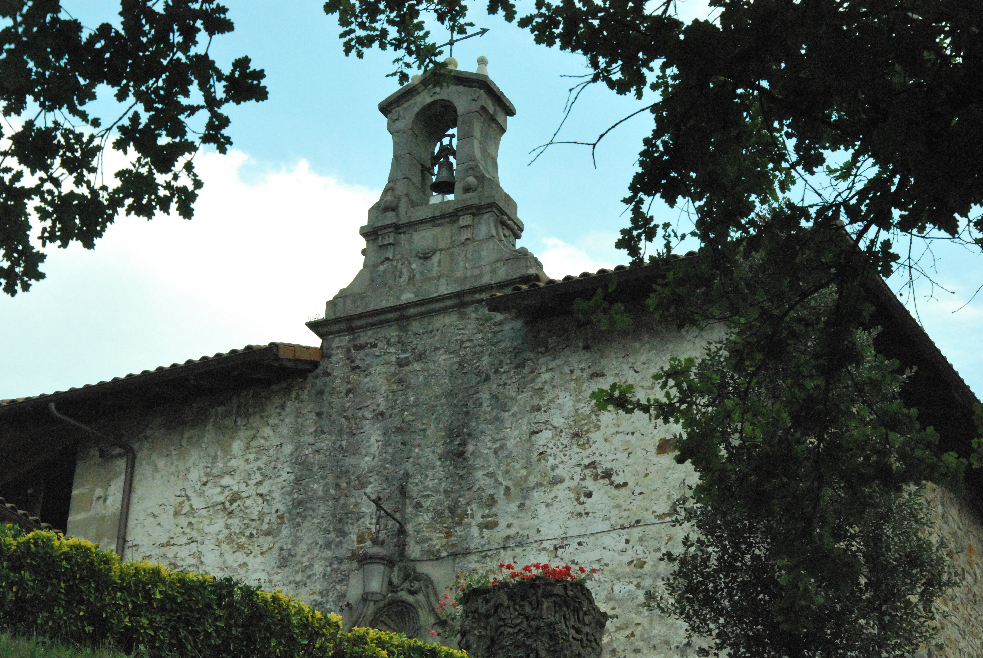 Oñatiko Santxolopetegi auzoko Madalena ermita